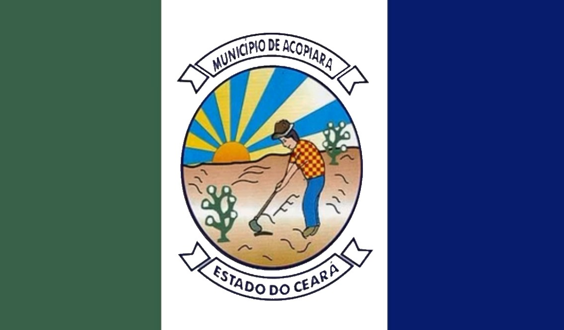 Bandeira do município de Acopiara, estado do Ceará, Brasil.